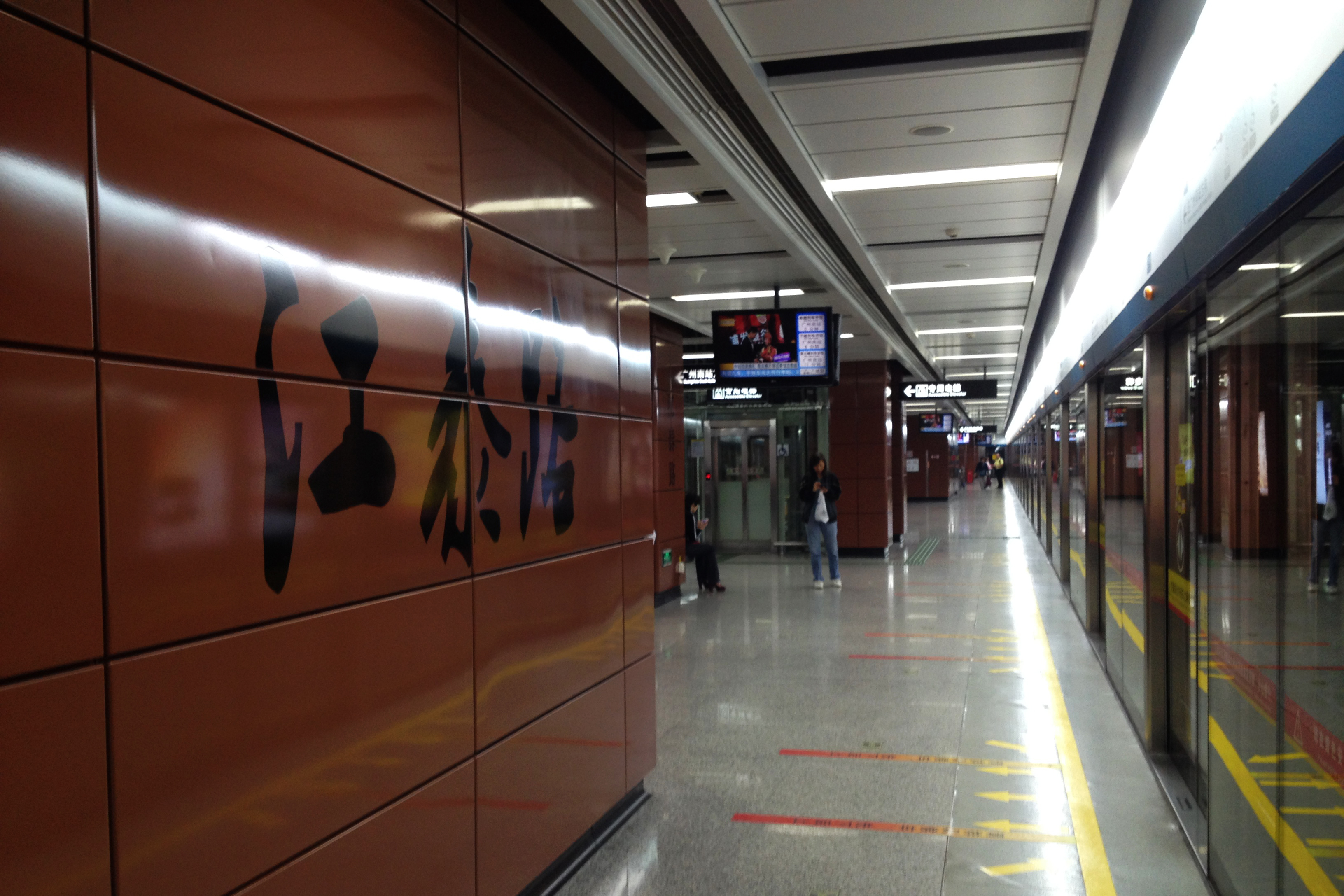 广州地铁江泰路站月台（广州南站方向）